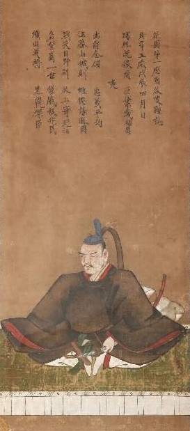 黒母衣衆筆頭、岩村城主・河尻秀隆の肖像画。